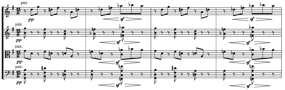 Debussy - Quatuor à cordes - à 15 temps